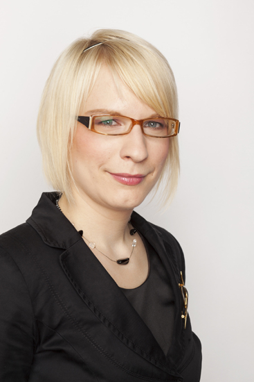 Kristýna Kočí, poslankyně za VV.